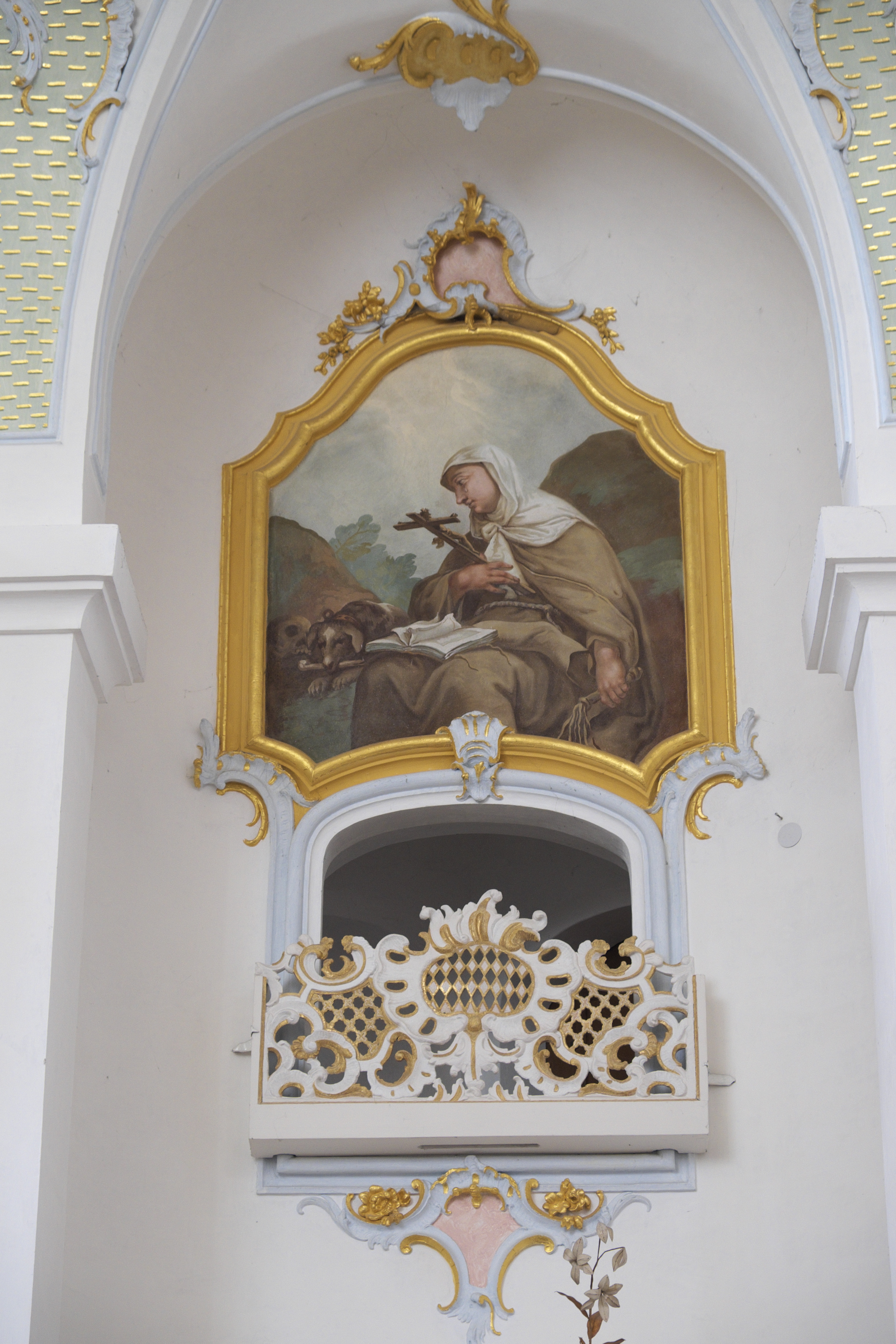 Katholische Pfarr- und Klosterkirche St. Alto und St. Birgitta in Altomünster im Landkreis Dachau (Bayern), Gemälde im Beichtraum, Darstellung: Margareta von Cortona